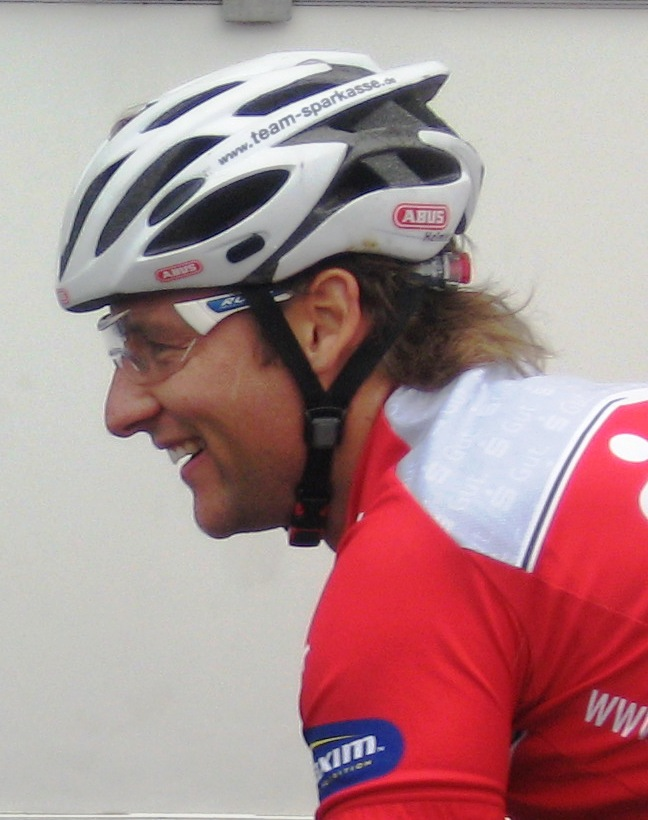 Christian Lademann, Radrennfahrer